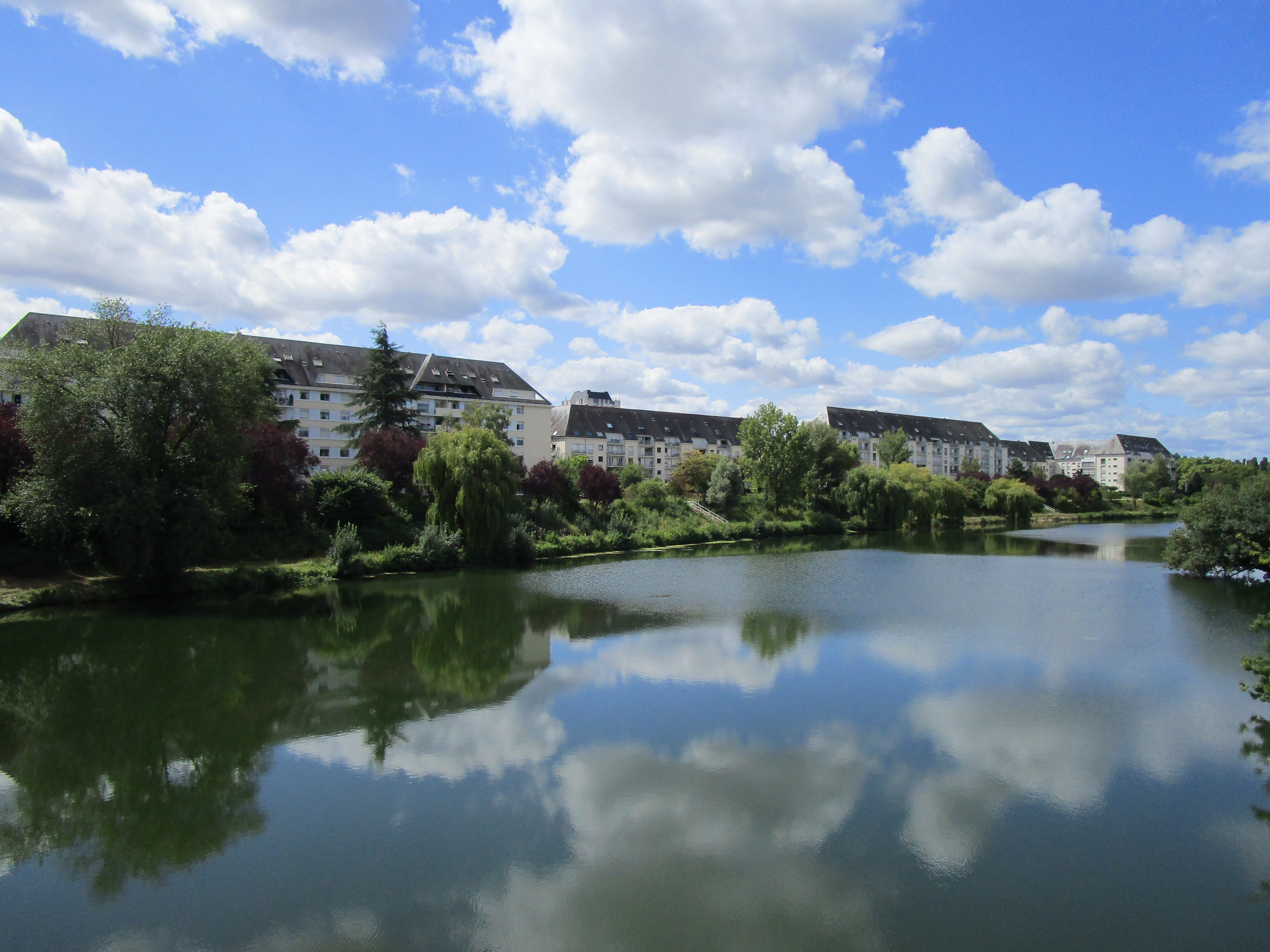 La partie nord du quartier des Fontaines et le Cher, vue depuis le parc Honoré de Balzac, à Tours.